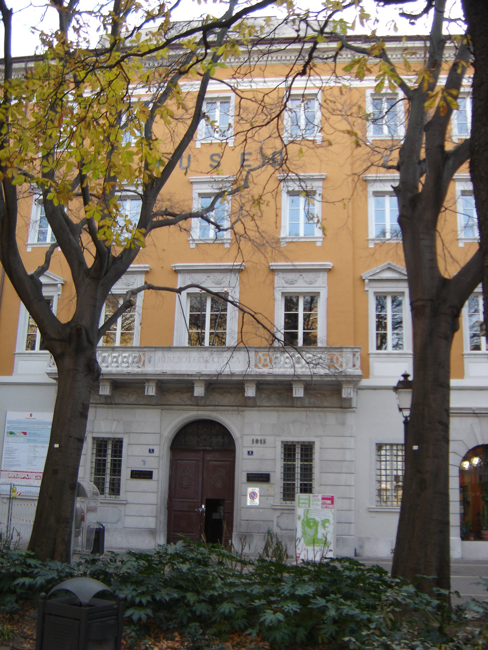 Museo di storia naturale, Piazza Hortis, Trieste – Italy